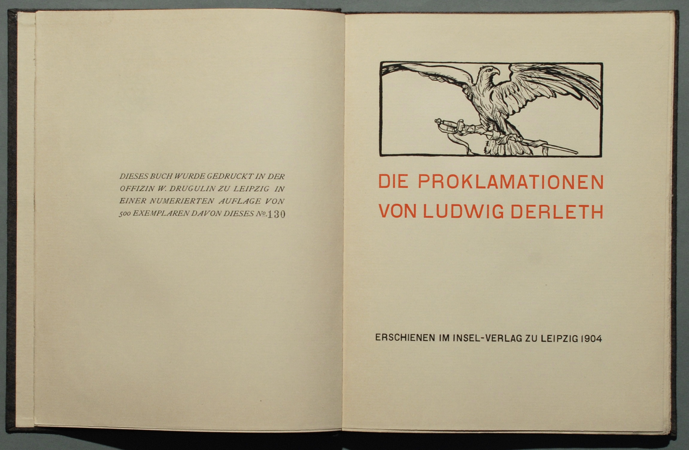 Derleth, Ludwig: Die Proklamationen von Ludwig Derleth. Exemplar 130 / 500. Leipzig: Insel-Verlag 1904, 83 Seiten. Die Lesung dieses Druckes 1904 in München beschreibt Thomas Mann in seiner Erzählung «Beim Propheten» [1]. Zu Ludwig Derleth → [2] In «Doktor Faustus» [3], im mittleren Teil des dreiteiligen Kapitel 34, kommentiert der fiktive Erzähler Derleths auf Bütten erschienene «Proklamationen» als einen lyrisch-rhetorischen Ausbruch schwelgerischen Terrorismus[’], dem man erhebliche Wortgewalt zugestehen mußte. [...] Dies alles war «schön» und empfand sich selber sehr stark als «schön»; es war «schön» auf eine grausam und absolut schönheitliche Weise, […] der steilste ästhetische Unfug, der mir vorgekommen [ist].“